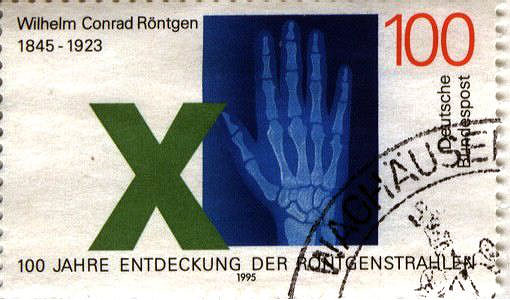 Briefmarke der Deutschen Post zum 150. Geburtstag von Wilhelm Röntgen